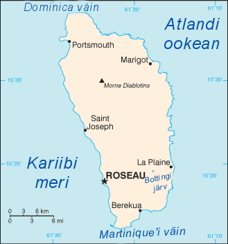 Dominica kaart